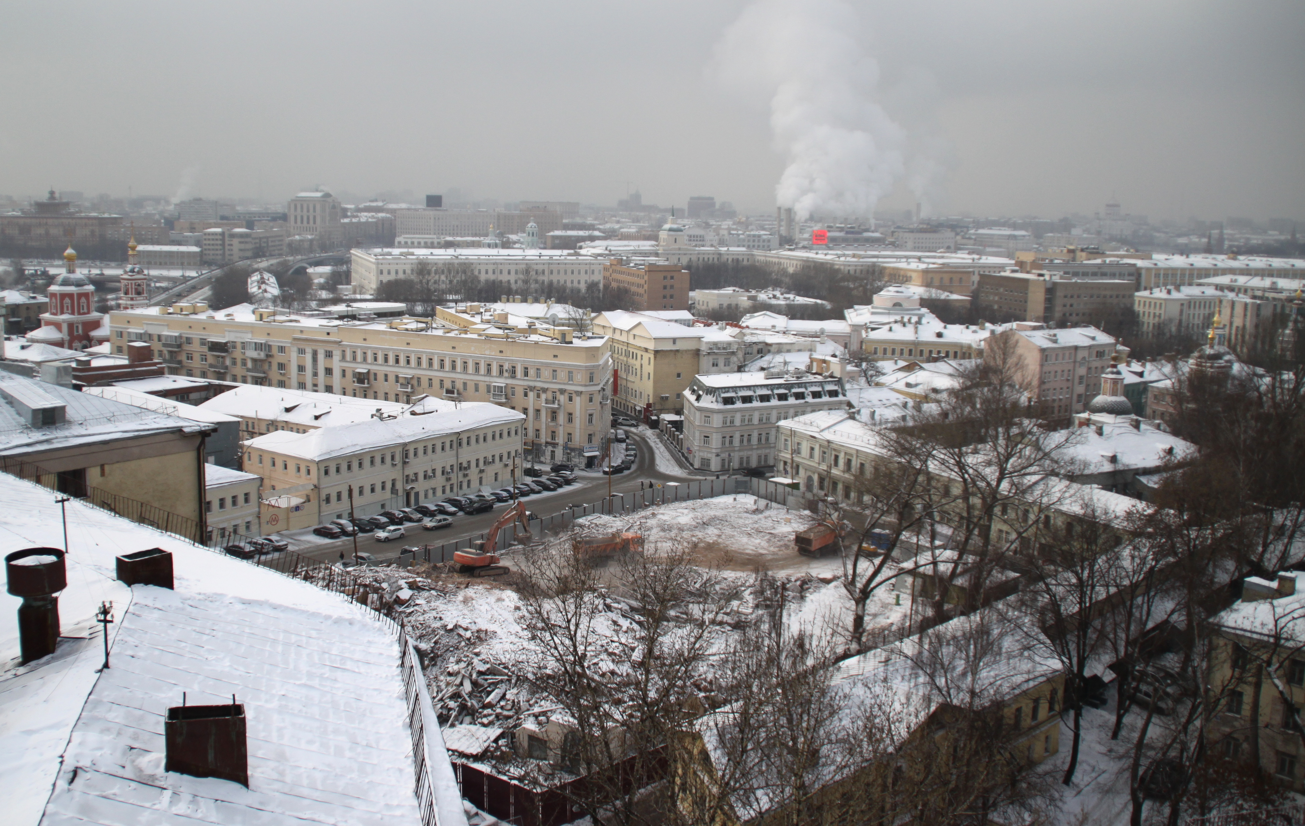 Вид Хитровской площади после сноса Электро-механического колледжа 25 января 2010 года.